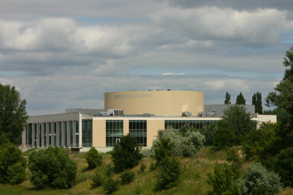 Centrum Wykładowo Konferencyjne przy ul. Piotrowo 2 w Poznaniu. Fot. Archiwum Biura Rektora Politechniki Poznańskiej (2005).